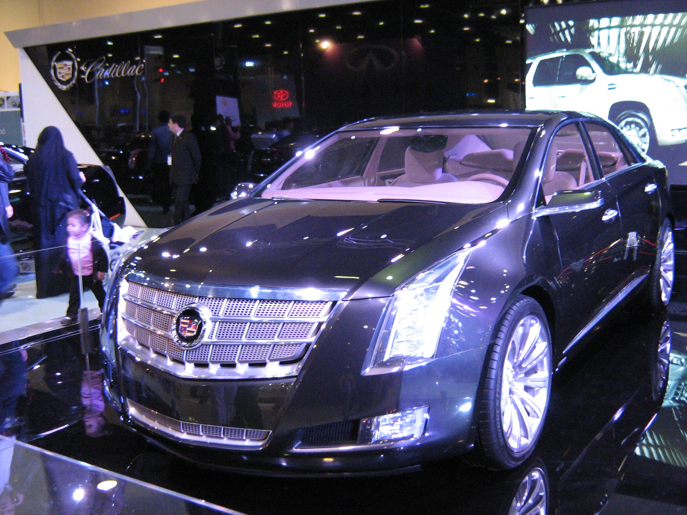 ഖത്തർ മോട്ടോർ ഷോയിൽ നിന്നും